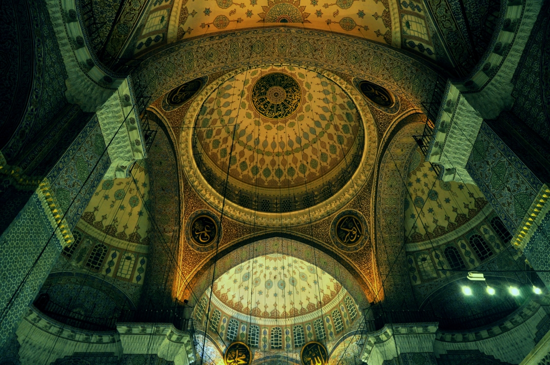 Istanbul Yeni Camii/ New Mosque